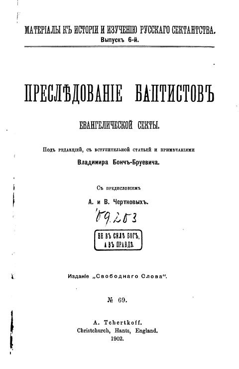 Титульный лист одного из выпусков материалов В. Д. Бонч-Бруевича, где рассказывается о преследованиях баптистов в период победоносцевских гонений